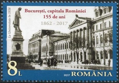 Памятник Иону Элиаде-Рэдулеску в Бухаресте на почтовой марке Румынии 2017 года